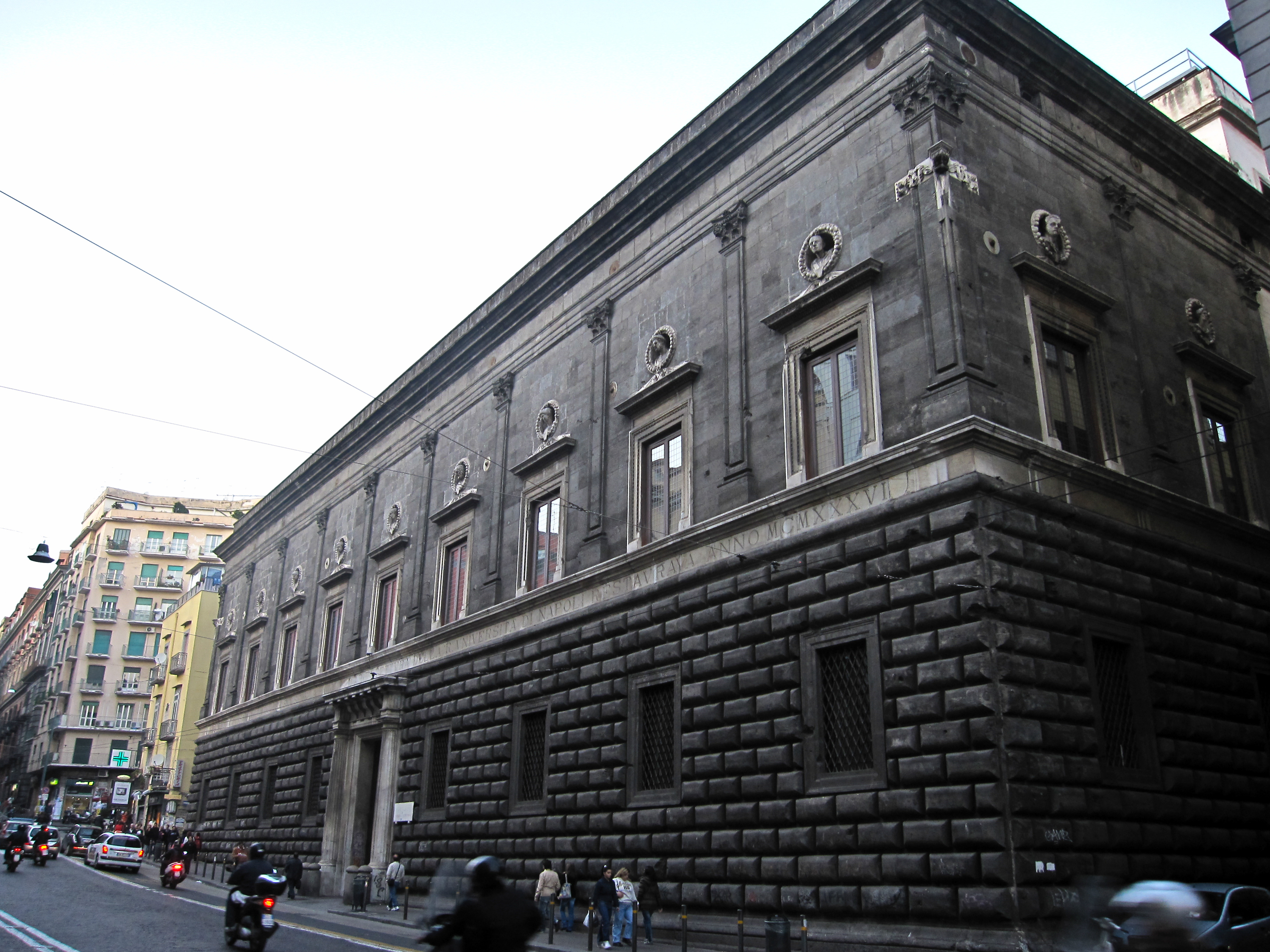 Palazzo Orsini Gravina (Napoli).